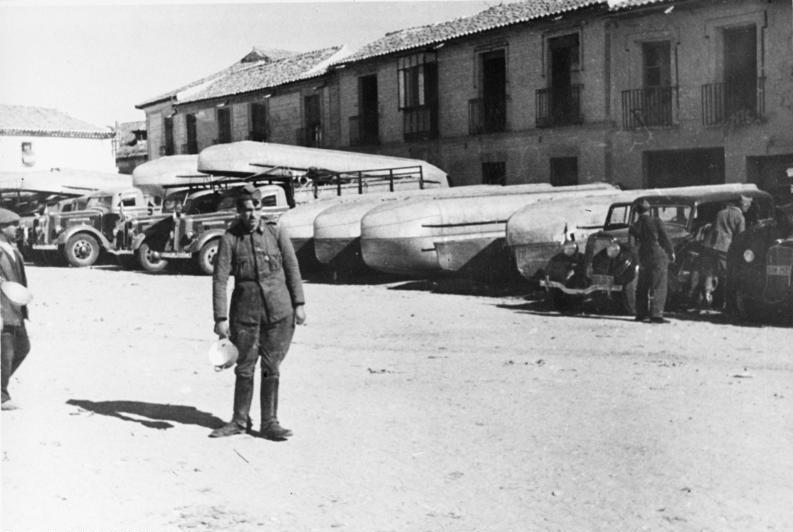 ADN-ZB Spanischer Freiheitskampf 1936 - 39 Bei den faschistischen Franco - Truppen. Pontons für den Brückenbau über den Manzanares stehen in Torija bereit. (Aufnahme 1936) 16448-36